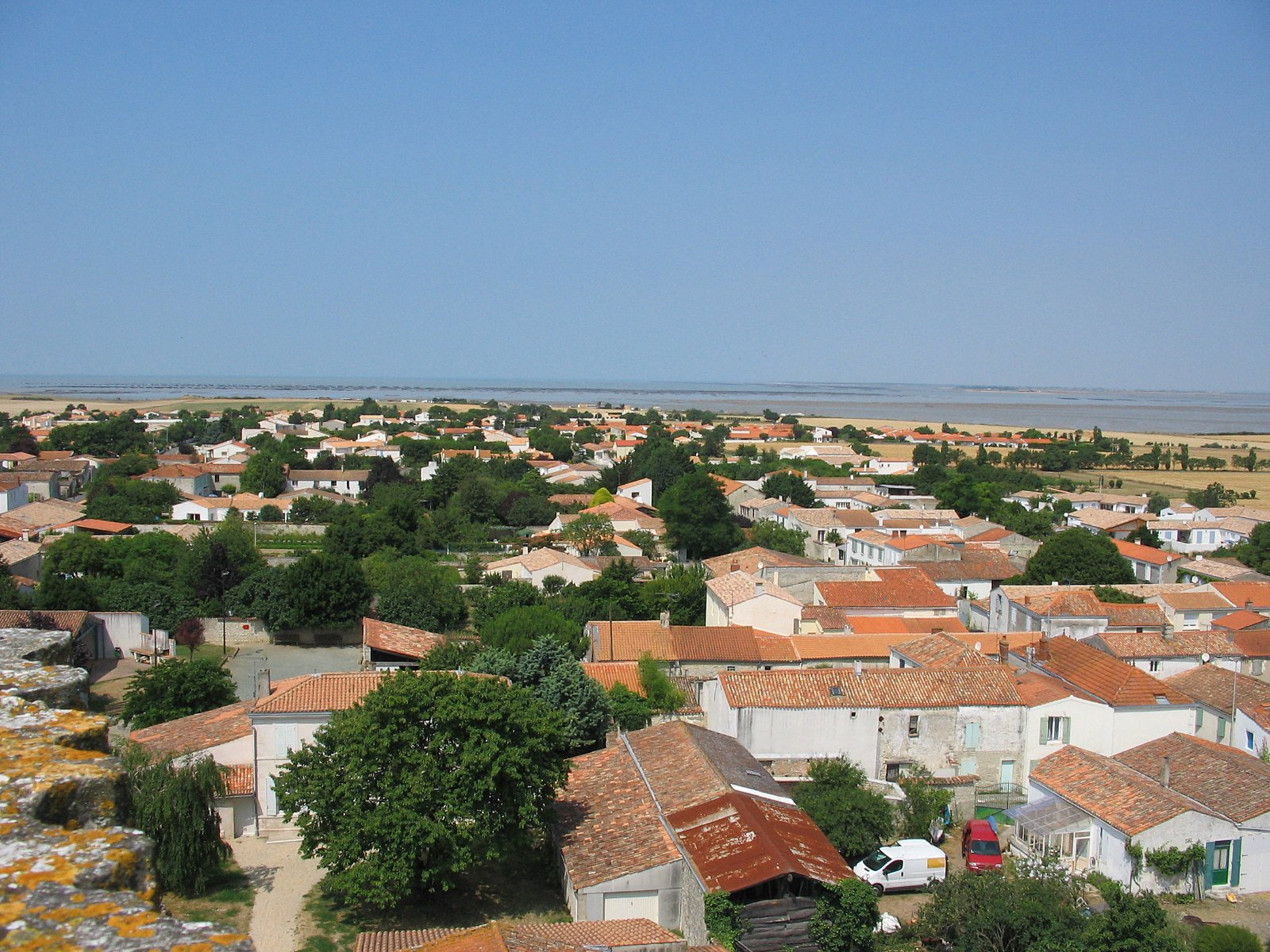 le village de Marsilly (Charente-Maritime) vue de la tour de l'église Saint-Pierre.